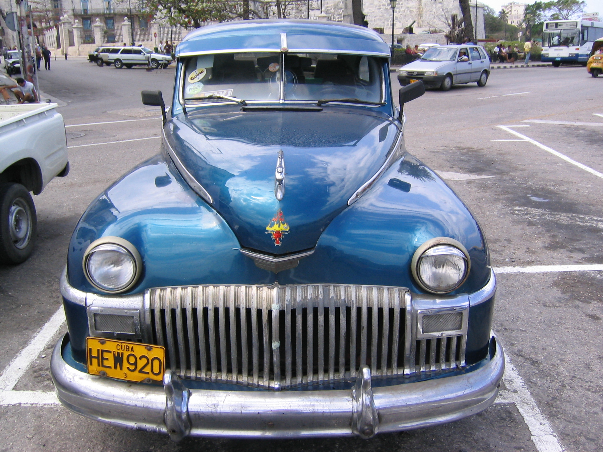 Havana 2005